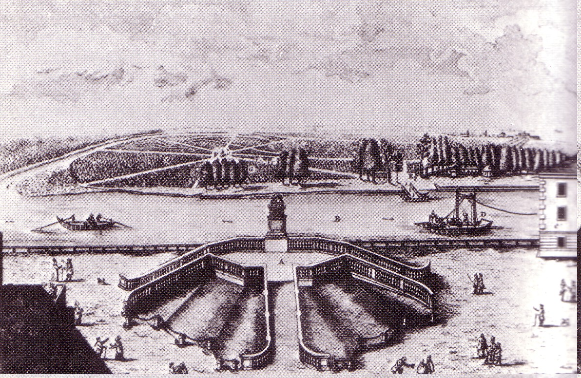 Zeitgenössische Darstellung des Krönigshügels, der sich an der Stelle des heutigigen Námestie Ľudovíta Štúra in Bratislava befand